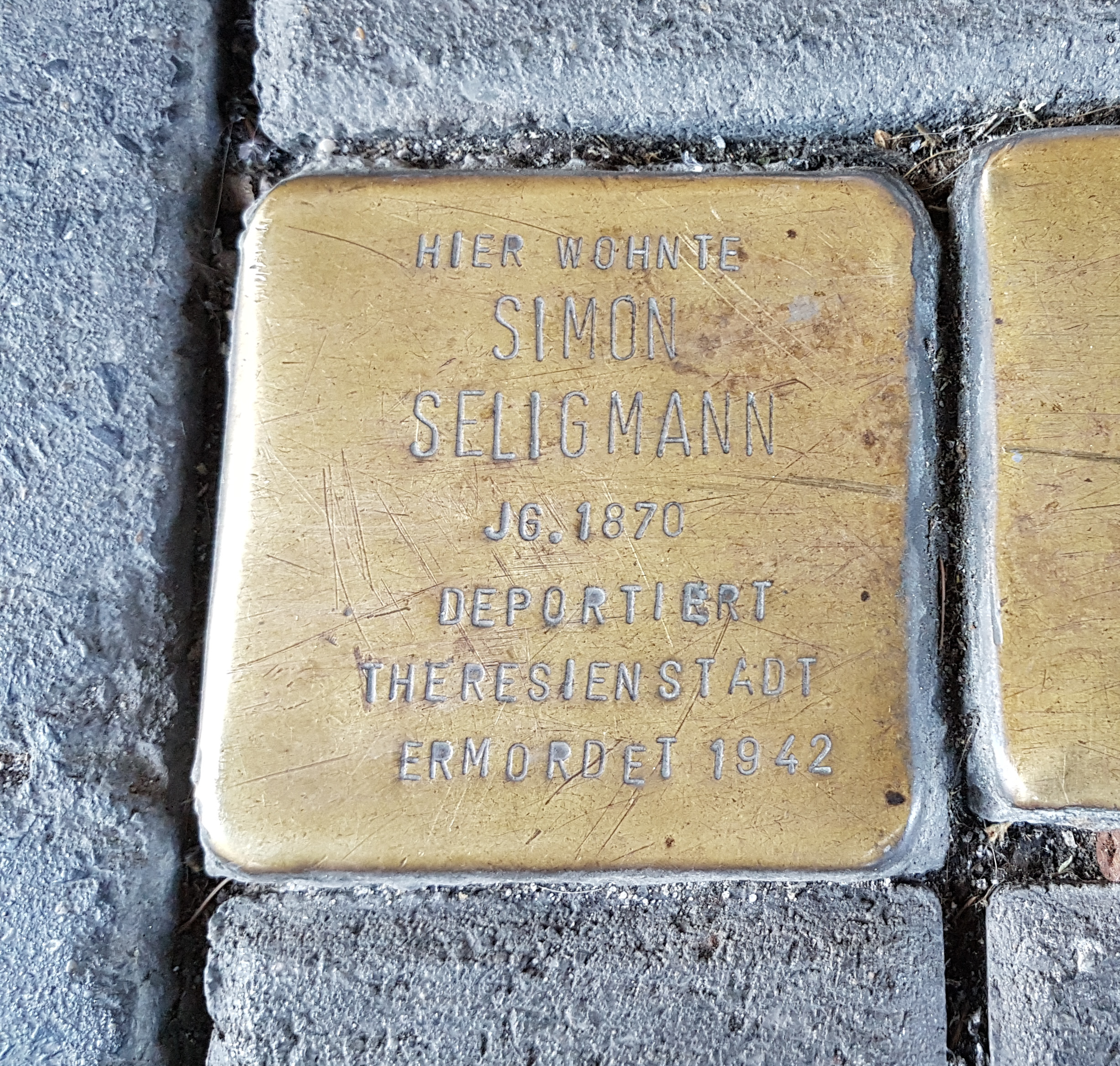 Simon Seligmann Stolperstein Duisburg